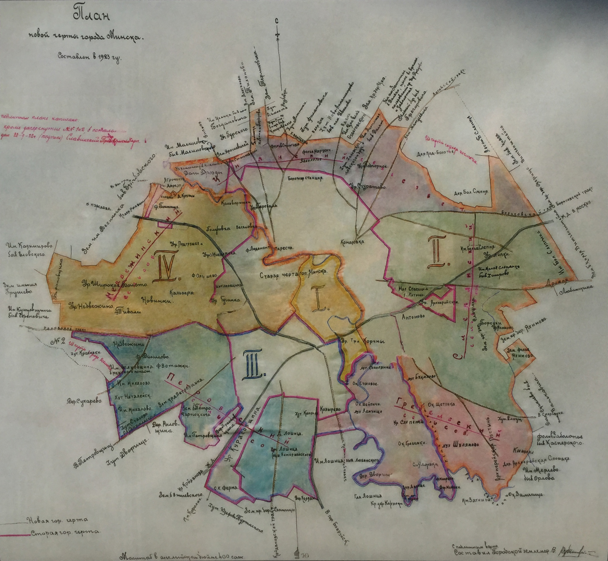 Беларуская (тарашкевіца): Менск (Miensk). Плян места, праект